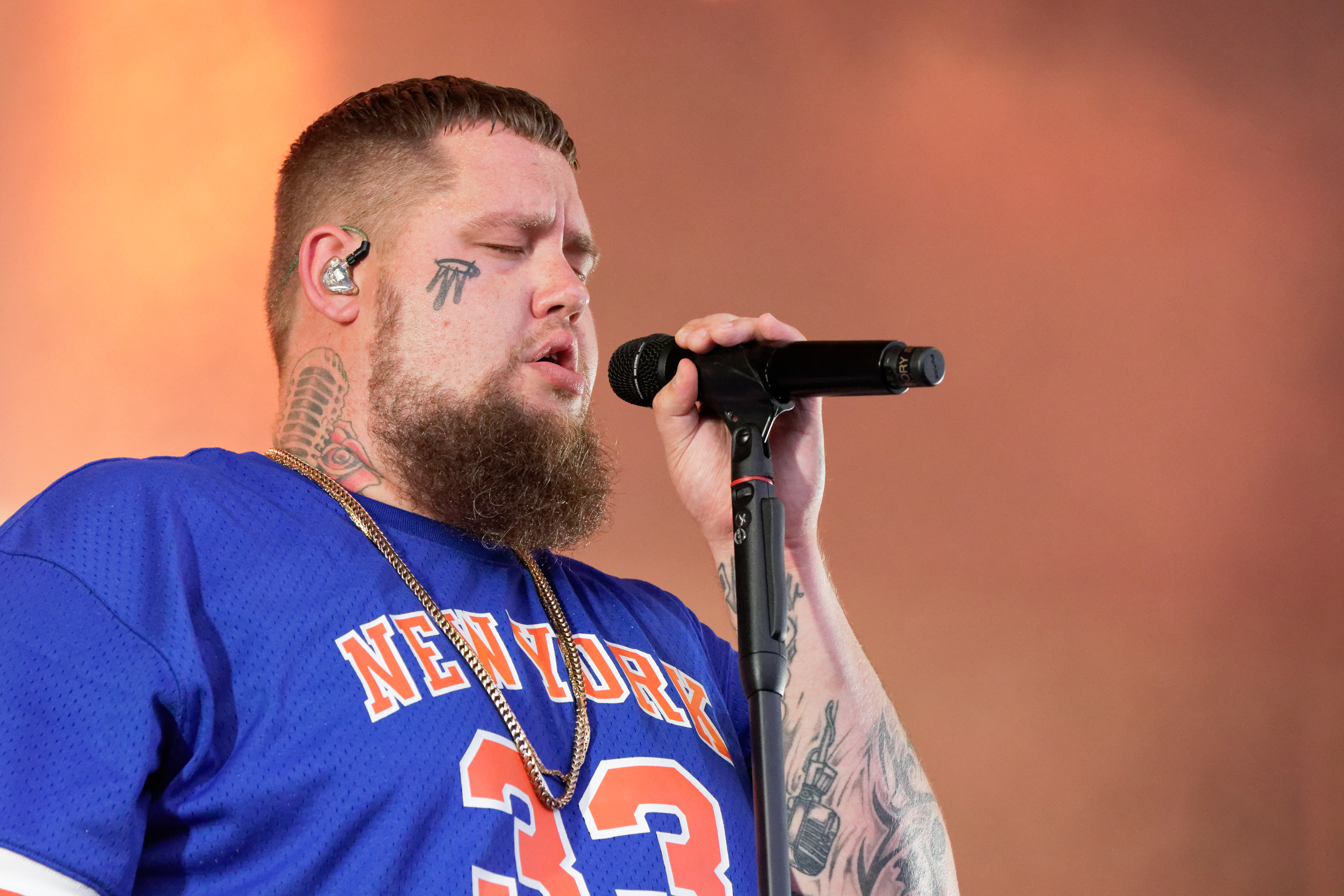 Rag'n'Bone Man en concert sur la scène Landaoudec lors du festival du Bout du Monde 2018 à Crozon dans le Finistère (France).